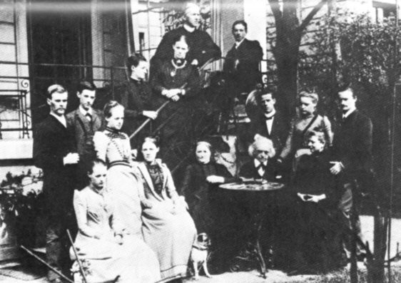 Theodor Mommsen: Familienfoto anläßlich des Polterabends von Mommsens Sohn Karl, aufgenommen in Berlin-Charlottenburg, Marchstraße.